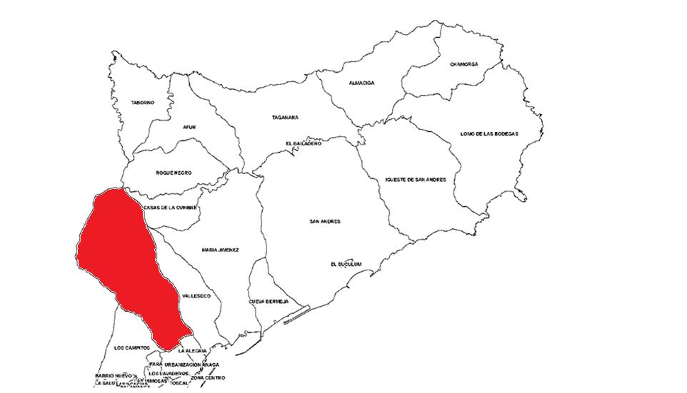 Localización de Valle Tahodio